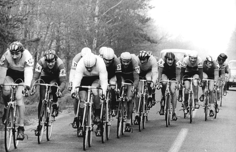 Friedensfahrt, Fahrerfeld ADN-ZB Reiche 22.4.77-str Cottbus: Fünf-Etappen-Fahrt auf Friedensfahrtkurs. Eine 18 köpfige Spitzengruppe bestimmt den Rennverlauf der zweiten Etappe von Berlin nach Cottbus über 132 km. Bereits beim Kilometer 47 zerriß das Feld und im Ziel hatten diese Fahre 2:54 min Vorsprung. Im Hintergrund 3.v.r. der spätere Etappensieger Bernd Drogan. Weitere Friedensfahrtkandidaten sind mit Siegbert Schmeißer [Siegbert Schmeisser] (3.v.l.), Karl-Dietrich Diers (4.v.l.) und dem Träger des Gelben Trikots, Andreas Petermann (6.v.l.) zu erkennen. Abgebildete Personen: Diers, Karl-Dietrich: Radsportler, Armeesportklub (ASK) Vorwärts Frankfurt/Oder, Friedensfahrer, DDR Drogan, Bernd: Radrennfahrer, Friedensfahrtteilnehmer, DDR Petermann, Andreas: Radsportler, Friedensfahrtteilnehmer, DDR Schmeisser, Siegbert: Radrennsportler, DDR